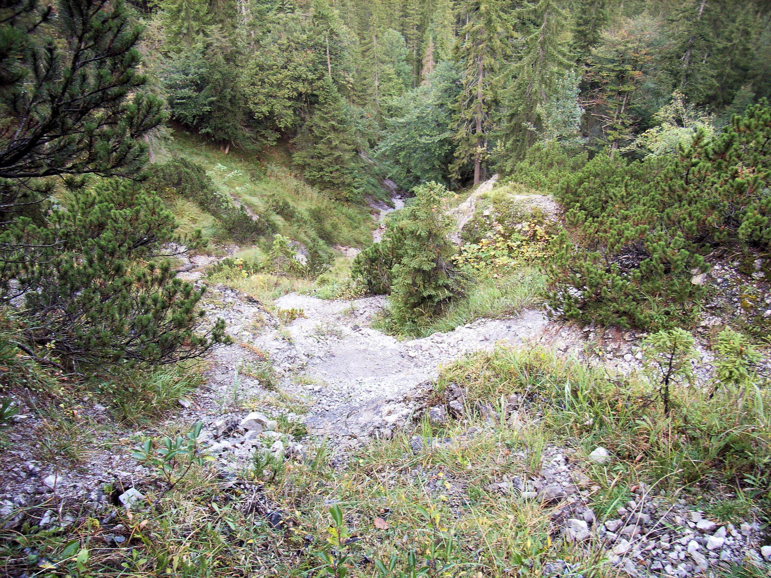 Der durch eine Steilrinne des Lohgartengraben führende Wanderweg BB1 in den Bayerischen Voralpen